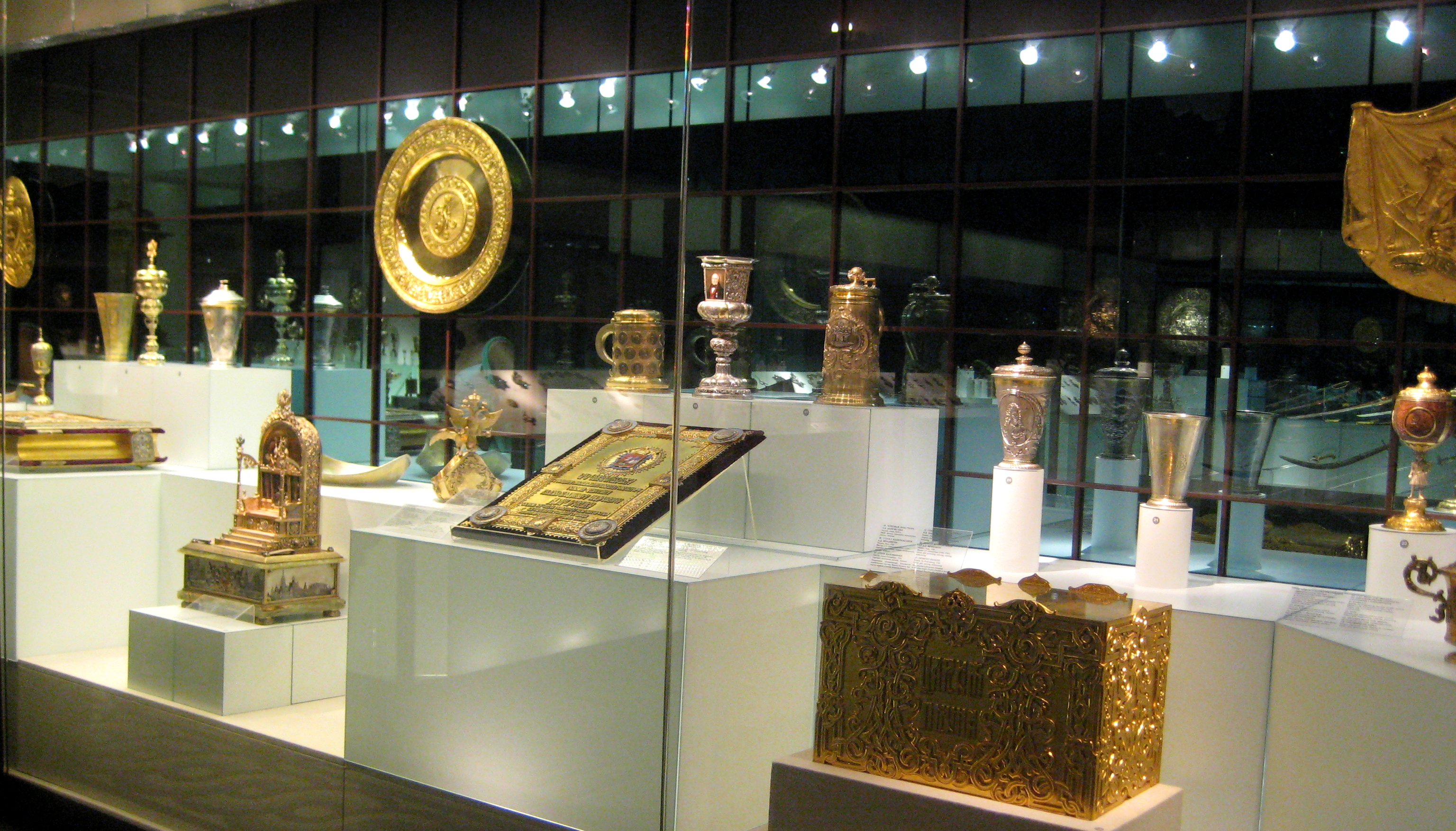 ГИМ, внутренние помещения. Выставка "Золото".